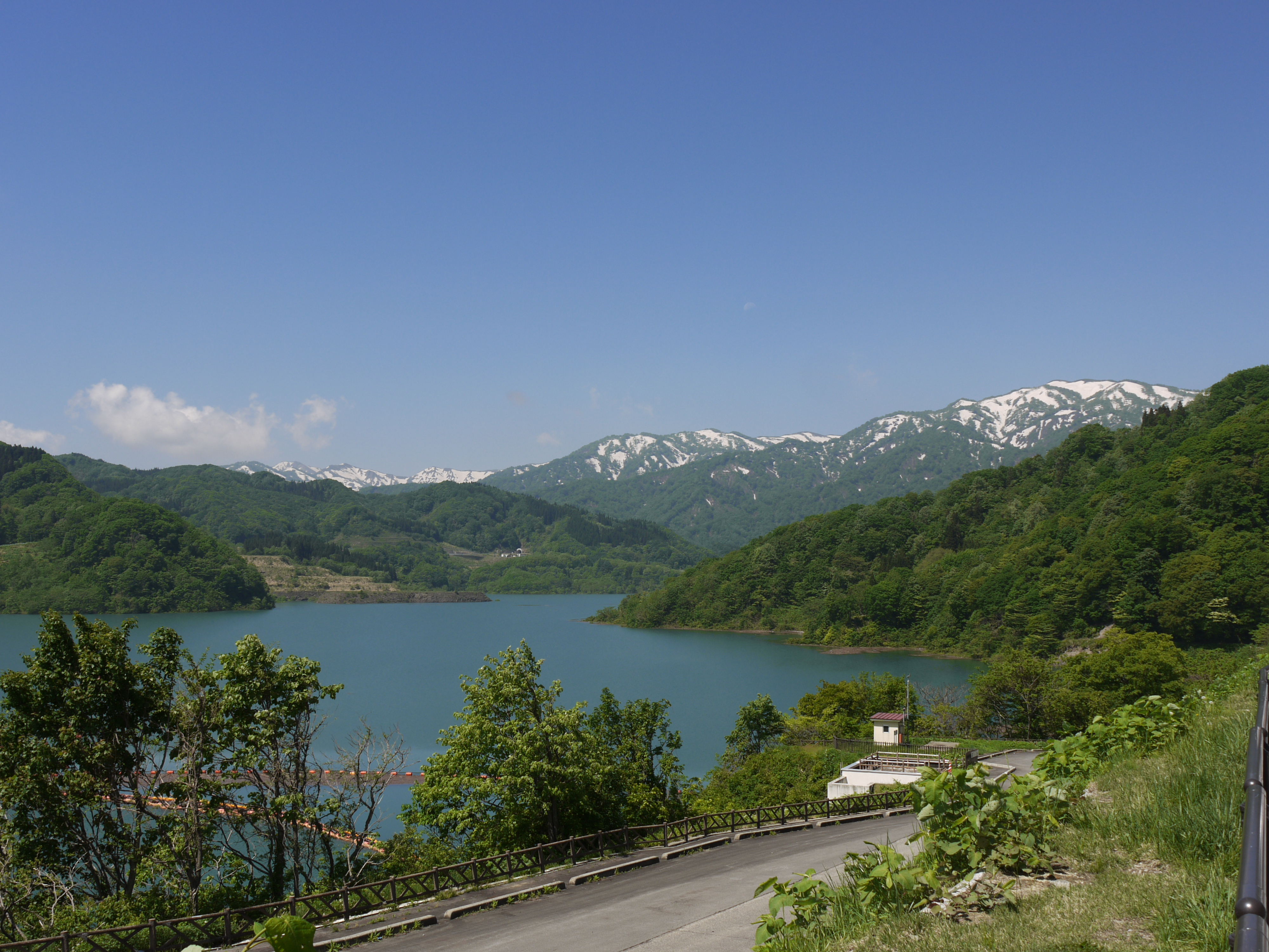 寒河江ダムのダム湖の月山湖。春の様子。右奥は石見堂岳。